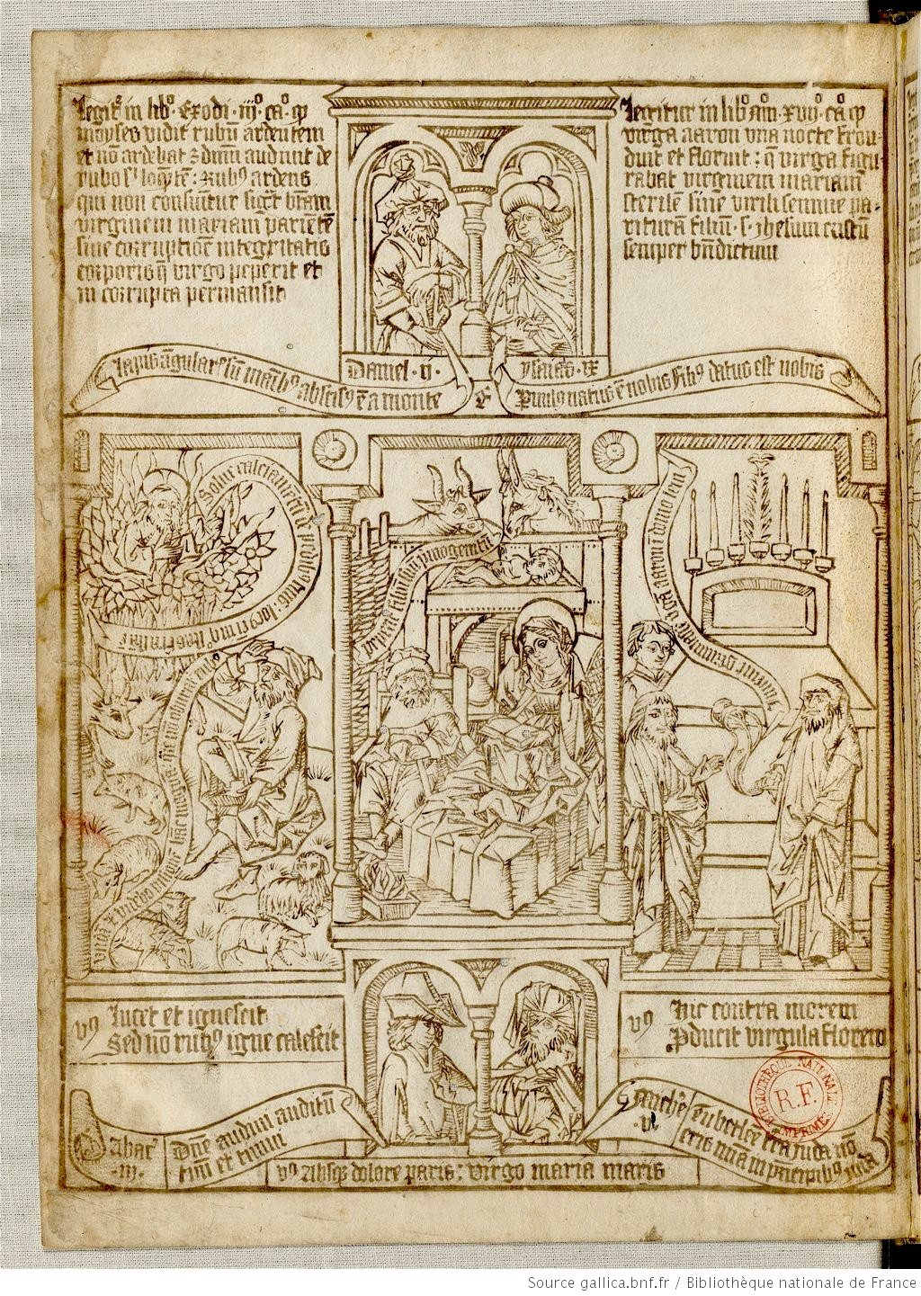 Biblia pauperum f16 de la BnF